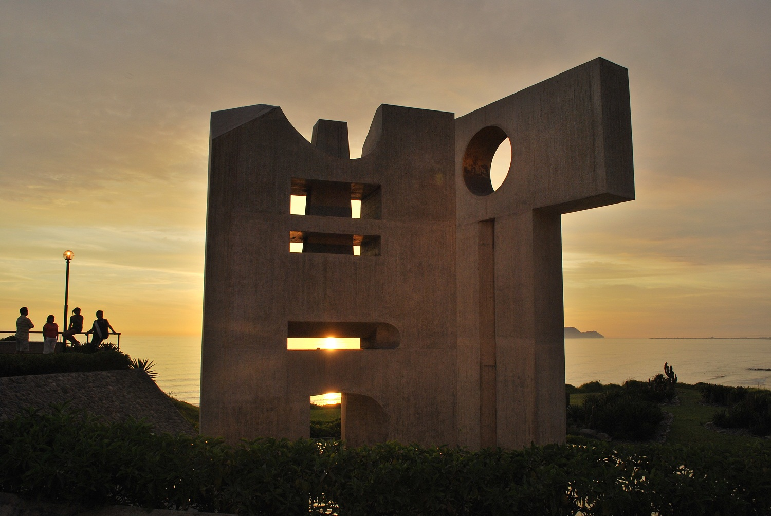 Escultura Intihuatana del artista peruano Fernando de Szyszlo. Miraflores, Lima. Perú.